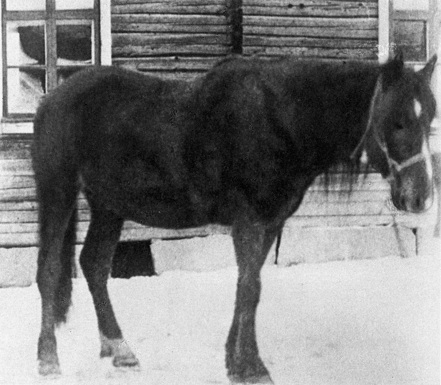 Nivalan konikapinan "tähti", maanviljelijä Siegfried Ruuttusen tamma Hilppa.